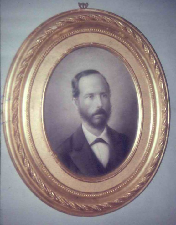 Fotográfía familial del Dr. Tadeo Acuña